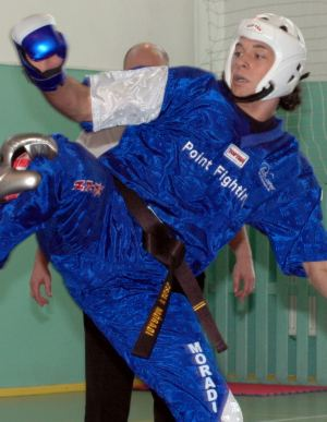 Zsolt Moradi